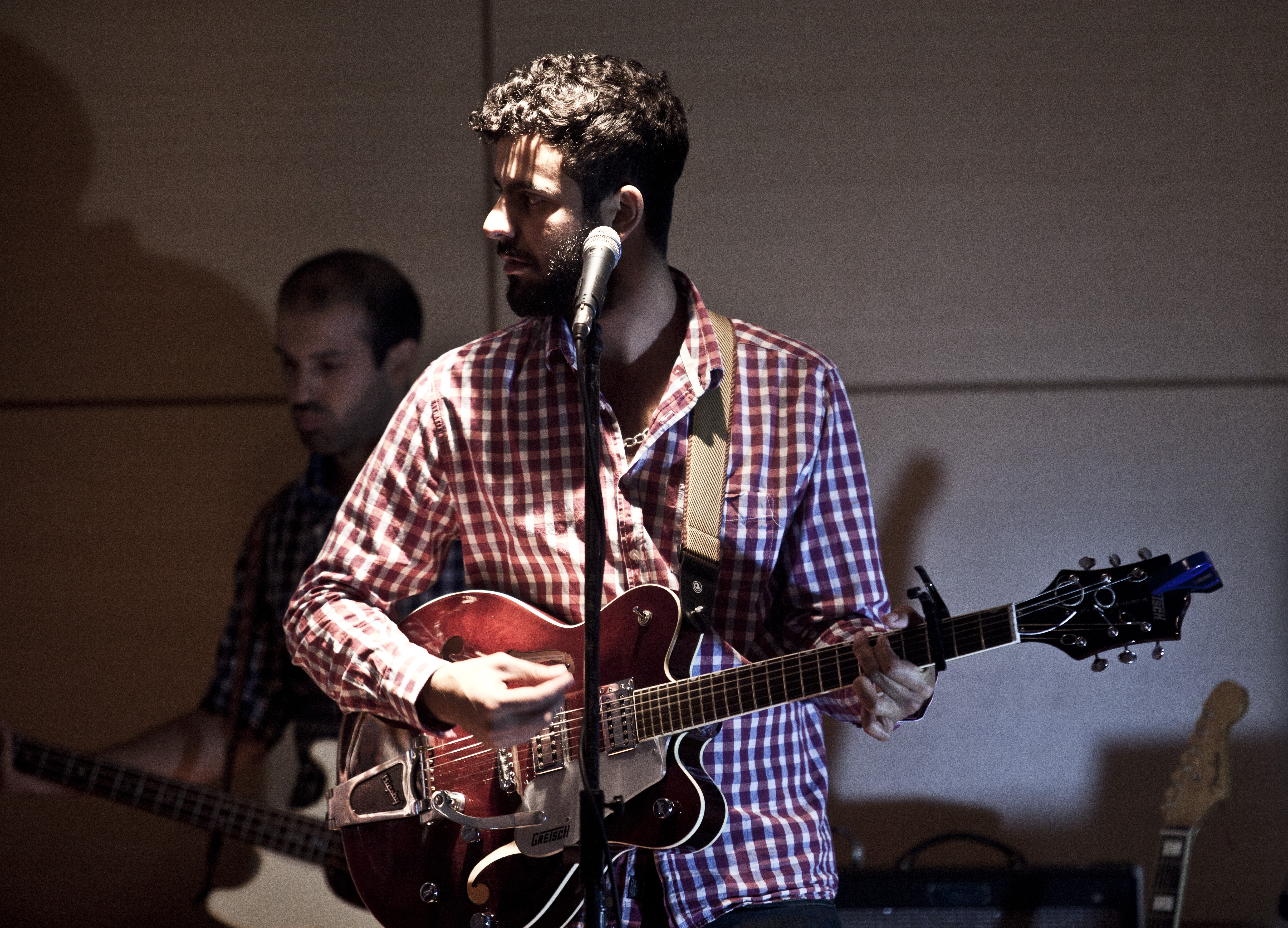 Nicolas Molina y Los Cósmicos, en una presentación en vivo.